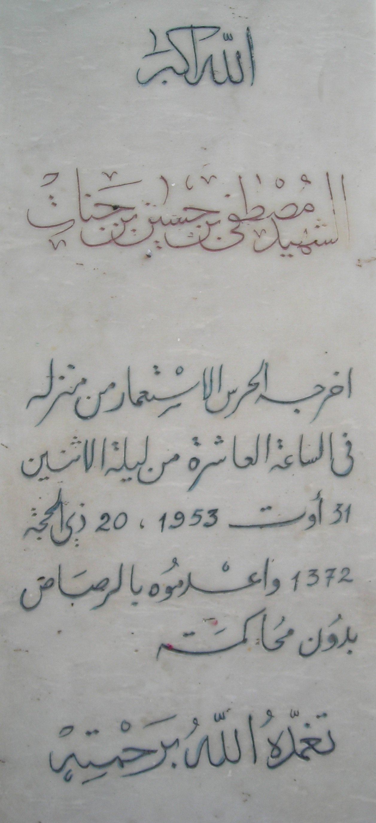 Tombe du martyr tunisien Mustapha Ben Hassine Ben Jannet qui a été enlevé de sa maison à Monastir la soirée du lundi 31 août 1953 par des gardes français, et exécuté par balles sans jugement.